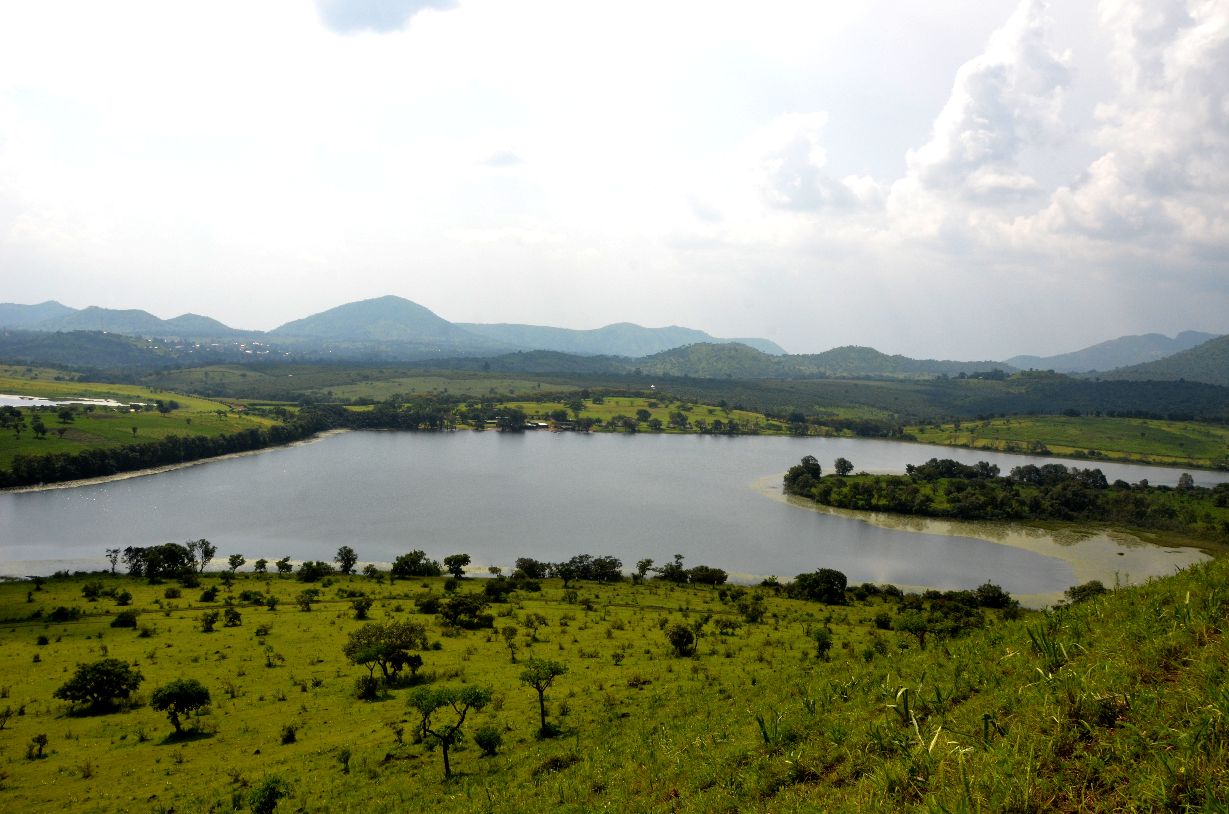 Le lac Petpenoun dans le Noun, dans la région de l'Ouest